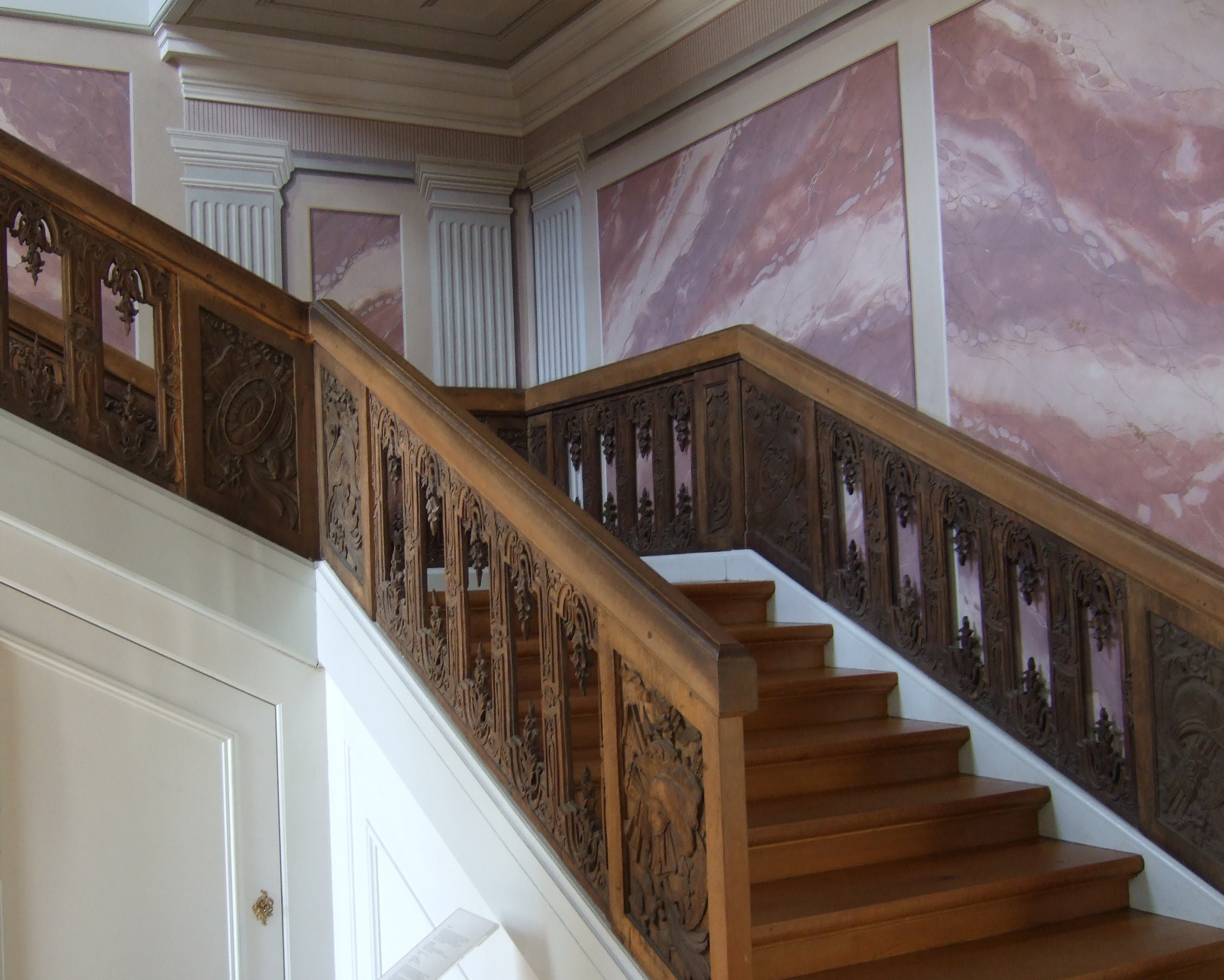 Die dreiläufige Treppe von Schloss Friedrichsfelde mit einem aus Eichenholz geschnitzten Geländer, deren Felder mit Wappenemblemen geziert sind, wurde 1719 von Martin Heinrich Böhme entworfen und zeigt im ornamentalen Detail den Einfluss von Andreas Schlüter, dessen Schüler und Gehilfe Böhme war. Markgraf Albrecht Friedrich von Brandenburg-Schwedt war der damalige Eigentümer. Nach mehrmaligem Besitzerwechsel beauftragte Prinz August Ferdinand von Preußen einen frühklassizistischen Umbau des Treppenhauses durch Carl von Gontard. Zur Ausführung ist es erst nach 1785 gekommen, nachdem August Ferdinand das Schloss an Herzog Peter von Kurland verkauft hatte. Die gemalten marmorierten Wandfelder - ursprünglich auf Leinwand ausgeführt - sowie die kannelierten Pilaster gehen auf Gontards Entwürfen zurück. Die Leinwandmalerei der Wände war nach 1945 noch erhalten gewesen, wurde aber 1947 entfernt und konnte daher nur nach kleinen Resten und nach Befunden wiederhergestellt werden.